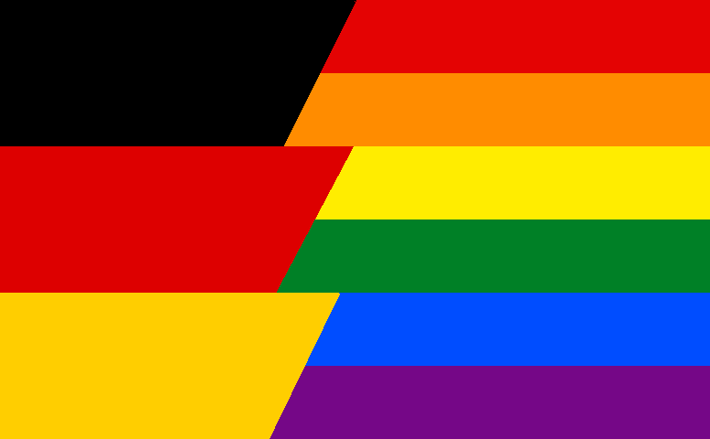 Bandera gay Alemania